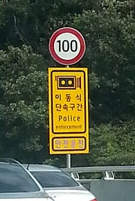 한국 고속도로 신호단속 경고 표지판 speed limit sign korea highway